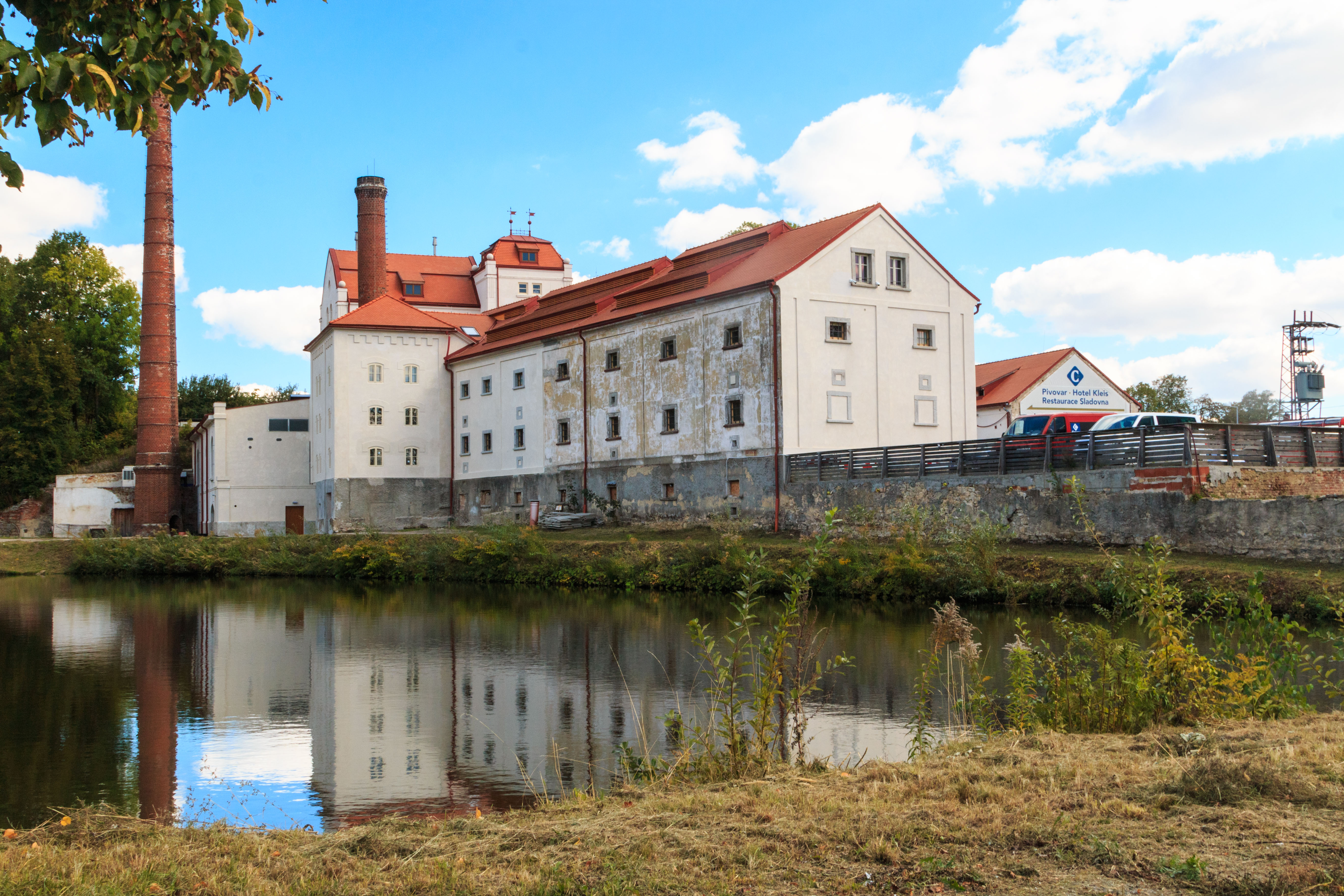 První rybník u Cvikova Project: Vodstvo.